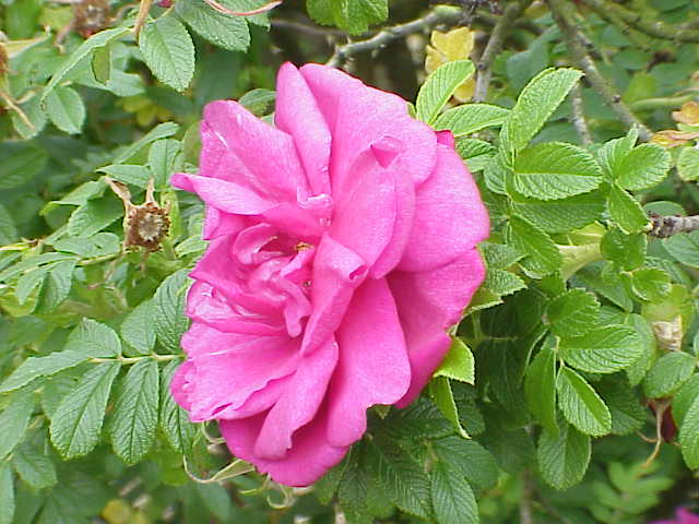 Species: Rosa rugosa Family: Rosaceae Cultivar: Roseraie de l´Haie, Cochet-Cochet Image No. 8